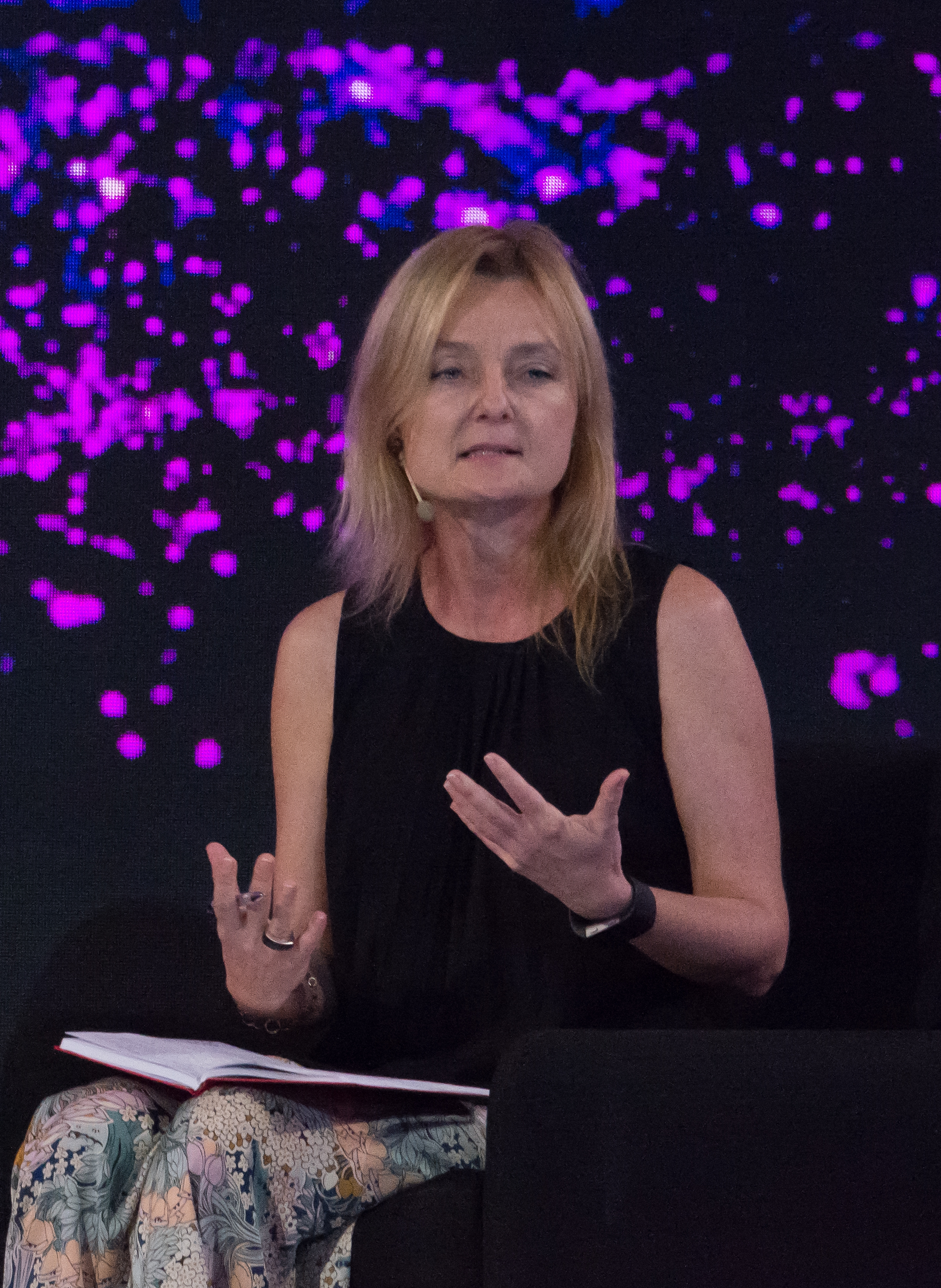 Magdalena Skipper, Congreso Futuro, Ex Congreso Nacional, Santiago, Región Metropolitana, Chile.